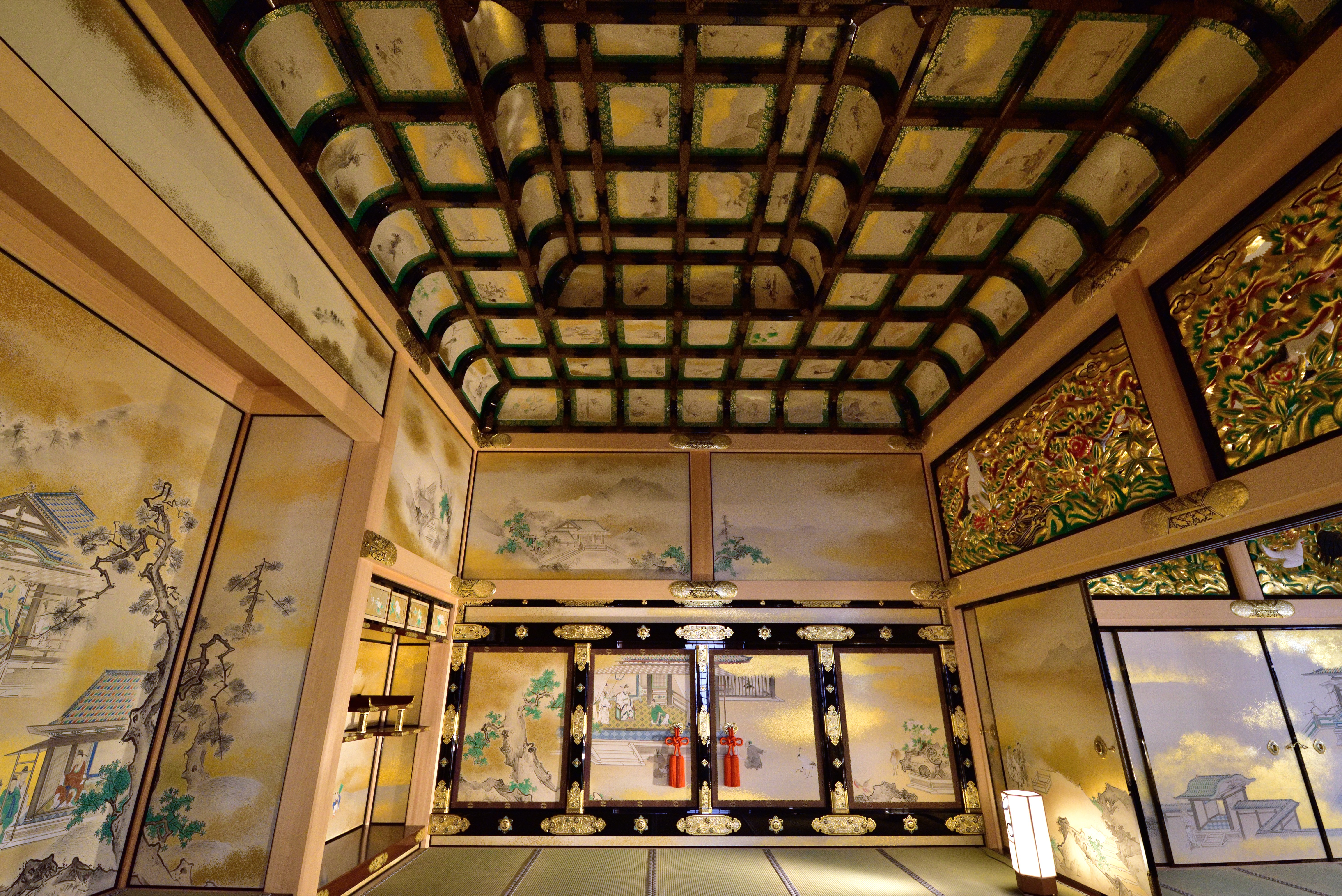 名古屋城本丸御殿 上洛殿（上段之間）